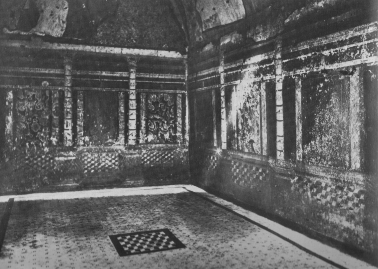 Descrizione: vedi titolo Fonte: Ranuccio Banchi Bandinelli e Mario Torelli, L'arte dell'antichità classica, Etruria-Roma, Utet, Torino 1976. Categoria:Immagini d'arte romana